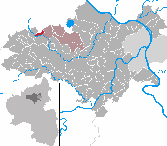 Volkesfeld in Rhineland-Palatinate - district Mayen-Koblenz